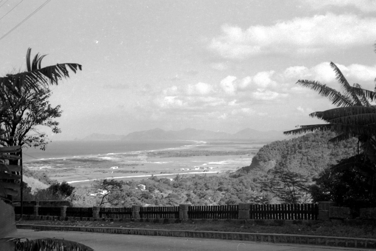 Barra da Tijuca nos anos 50 vista da Estrada do Joá.